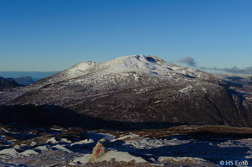 Blåskjerdingen sett fra Frostadtind Januar 2013.